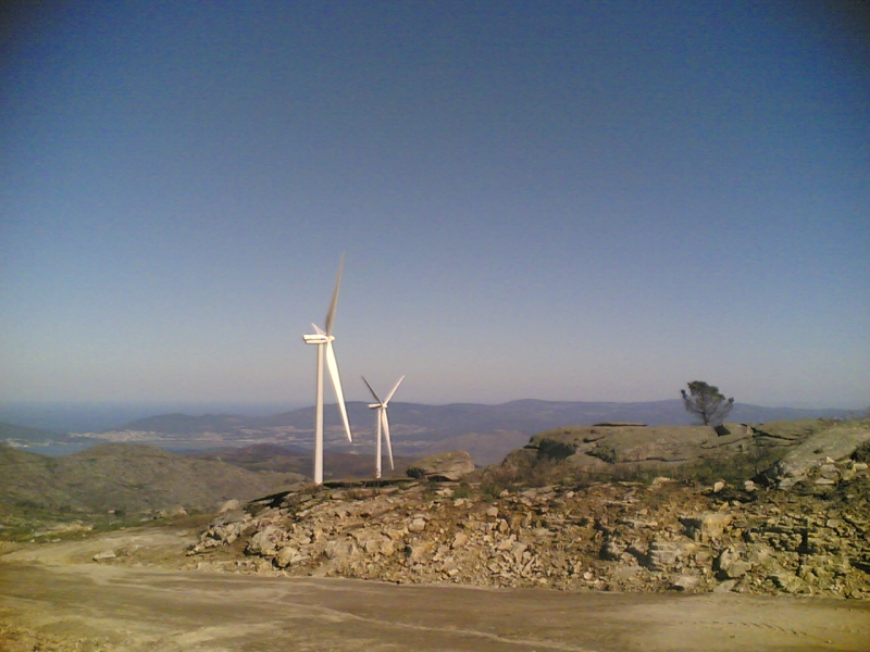 Parque eólico da Serra D'Arga, próximo de Caminha, Portugal - 36 MW